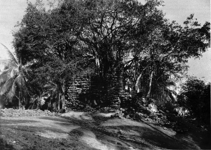 Foto. De ruïne van het zestiende eeuwse Portugese fort op Poelau Ende